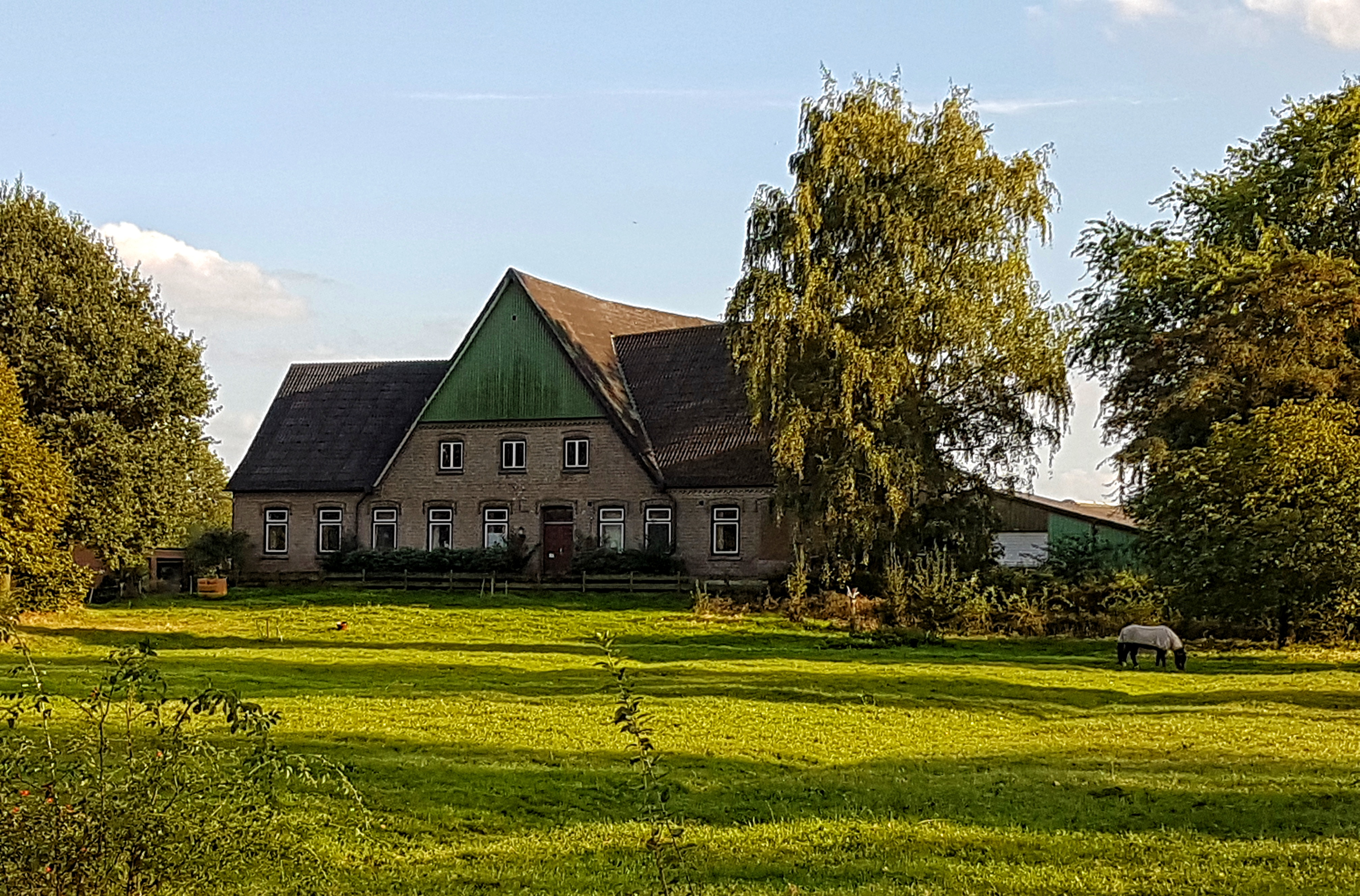 Hallenhaus in der Dorfstraße 37, in Raa-Besenbek. Ortsteil Raa.